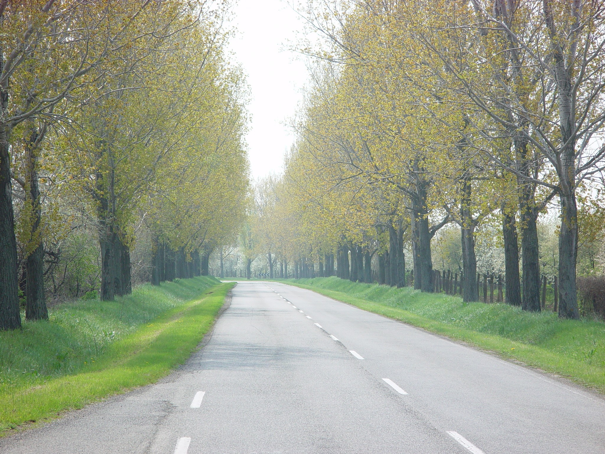 Egy tavaszi országút Magyarországon